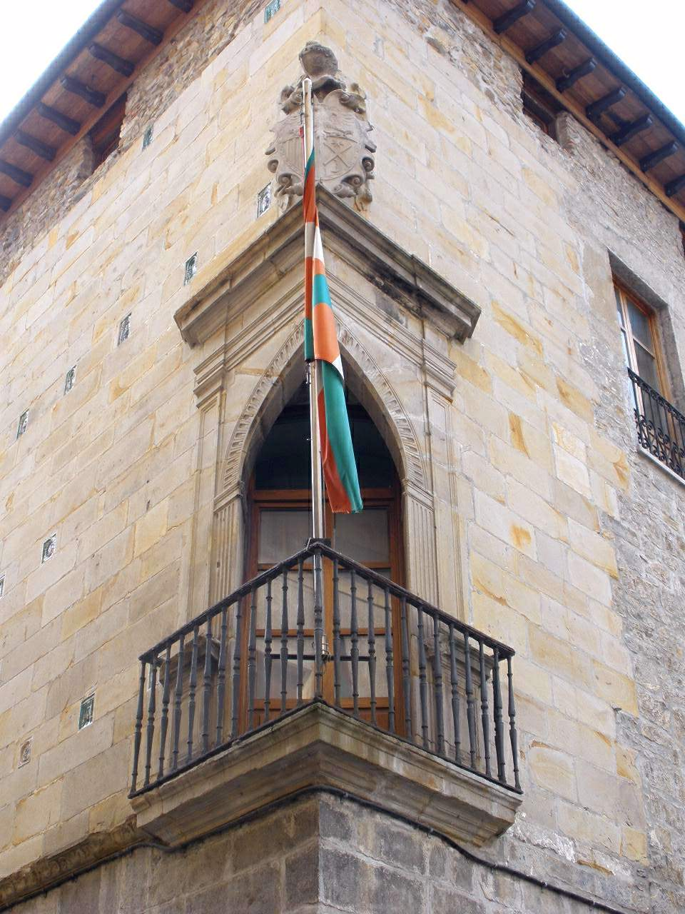 Casa Azkarate Marutegi, Bergara (Gipuzkoa)